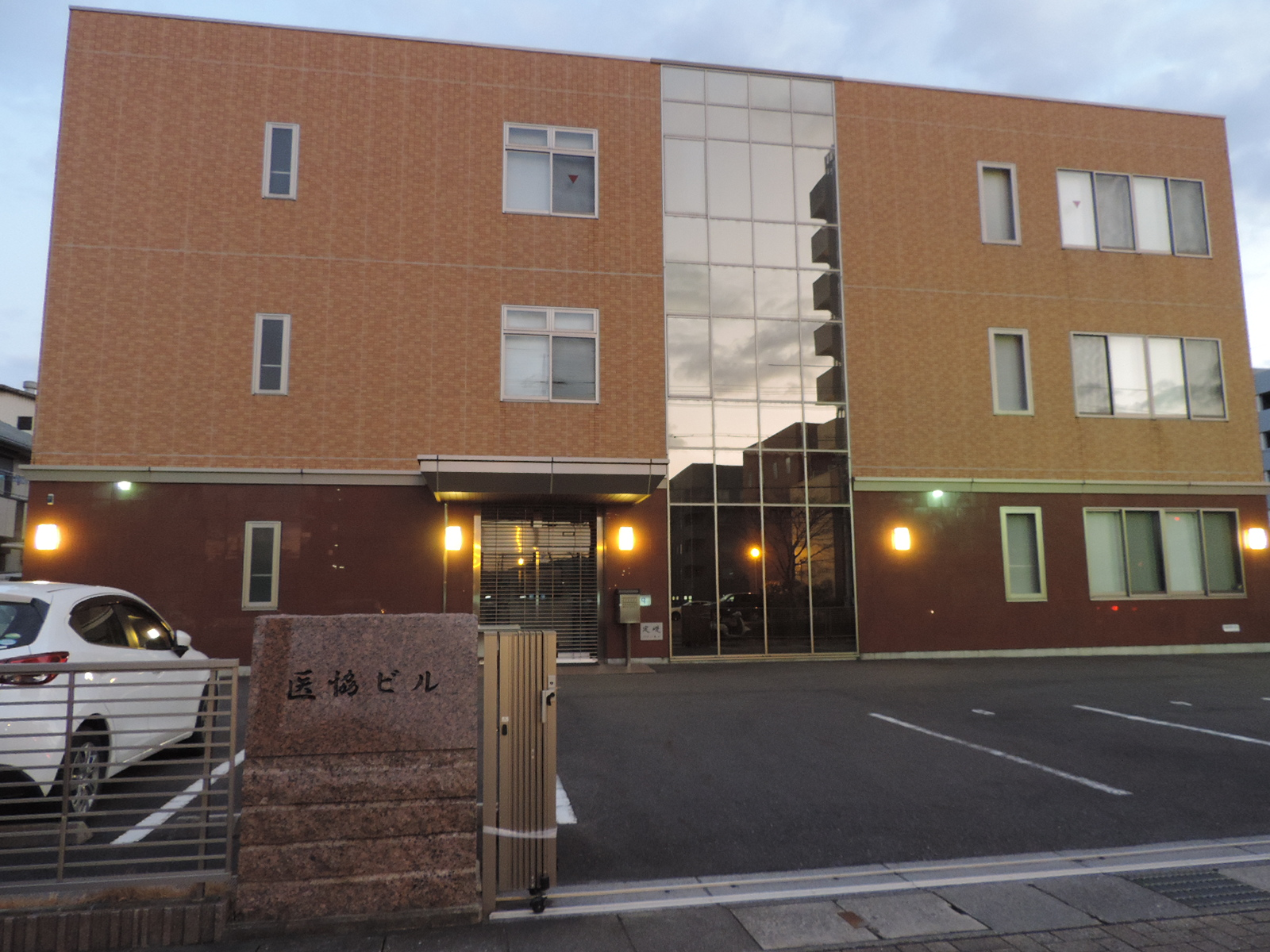 滋賀県医師会本部（栗東市：2017年撮影）